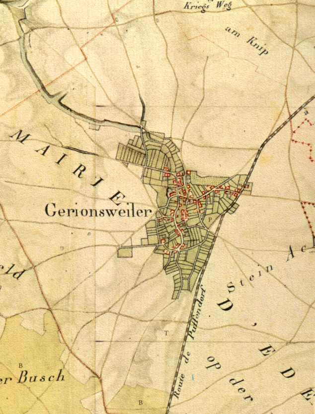 Map of Mairie de Schwanenberg (Germany); Kartenaufnahme des Rheinlands von Tranchot/Müffling, (Aufnahme von 1806/07)